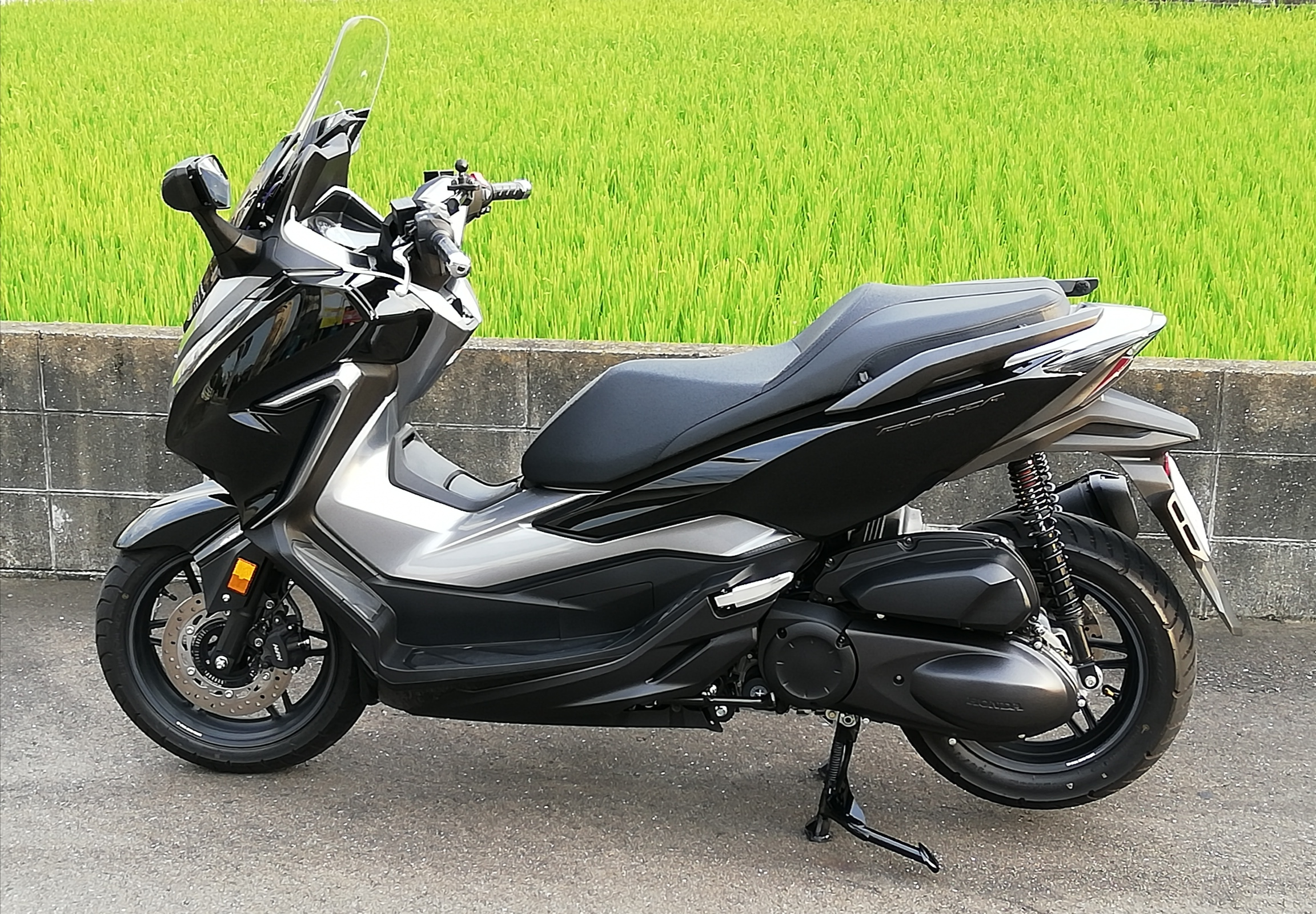 forza MF13